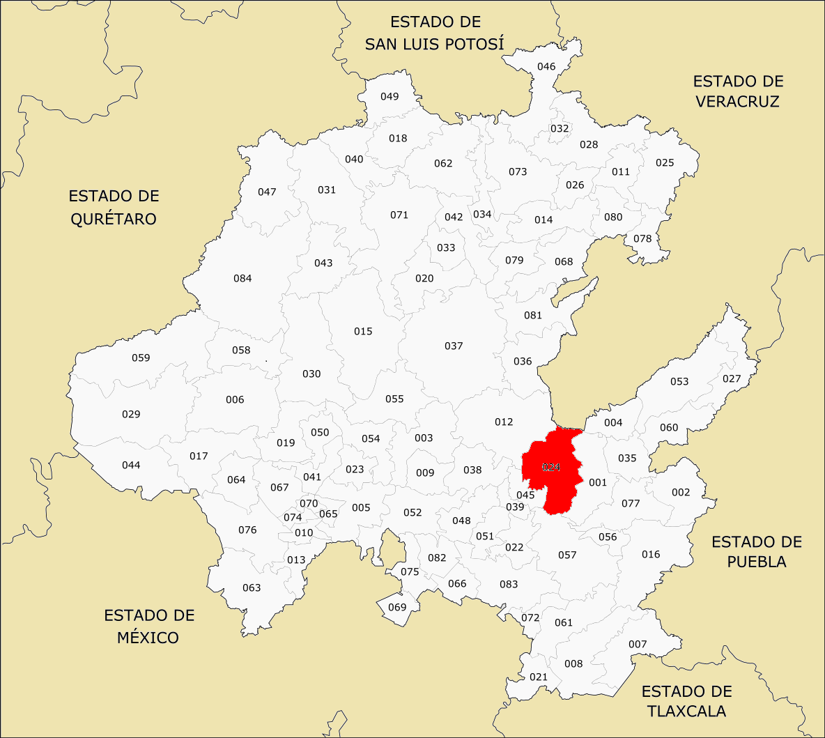 Municipios de Hidalgo